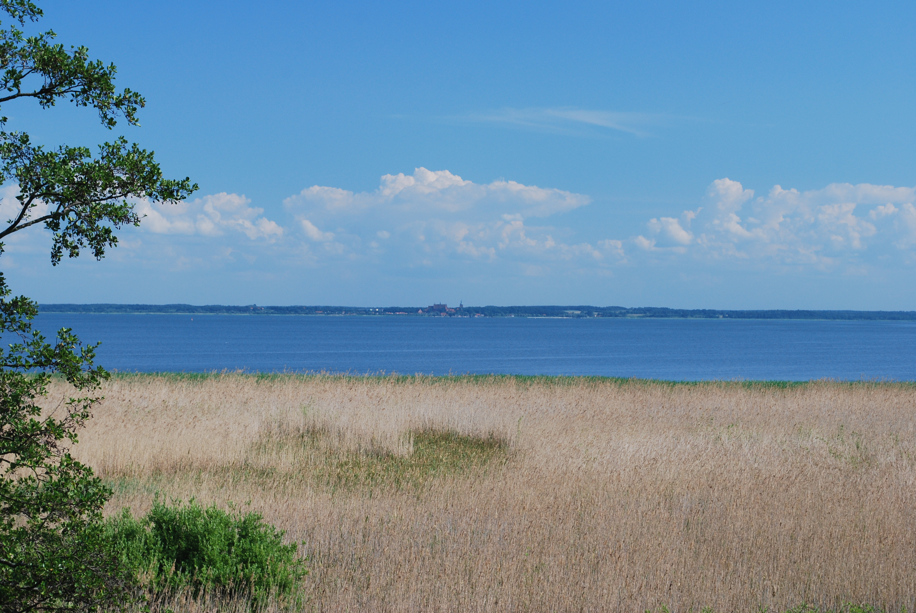 Widok na Frombork z Piasków, na Mierzei Wiślanej